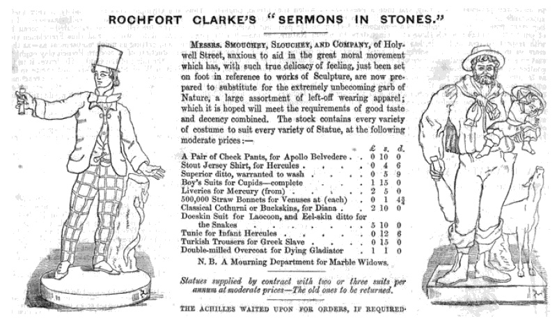 Caricatura das estátuas Apolo de Belvedere e Hércules e Télefo, vestidas com trajes do século XIX